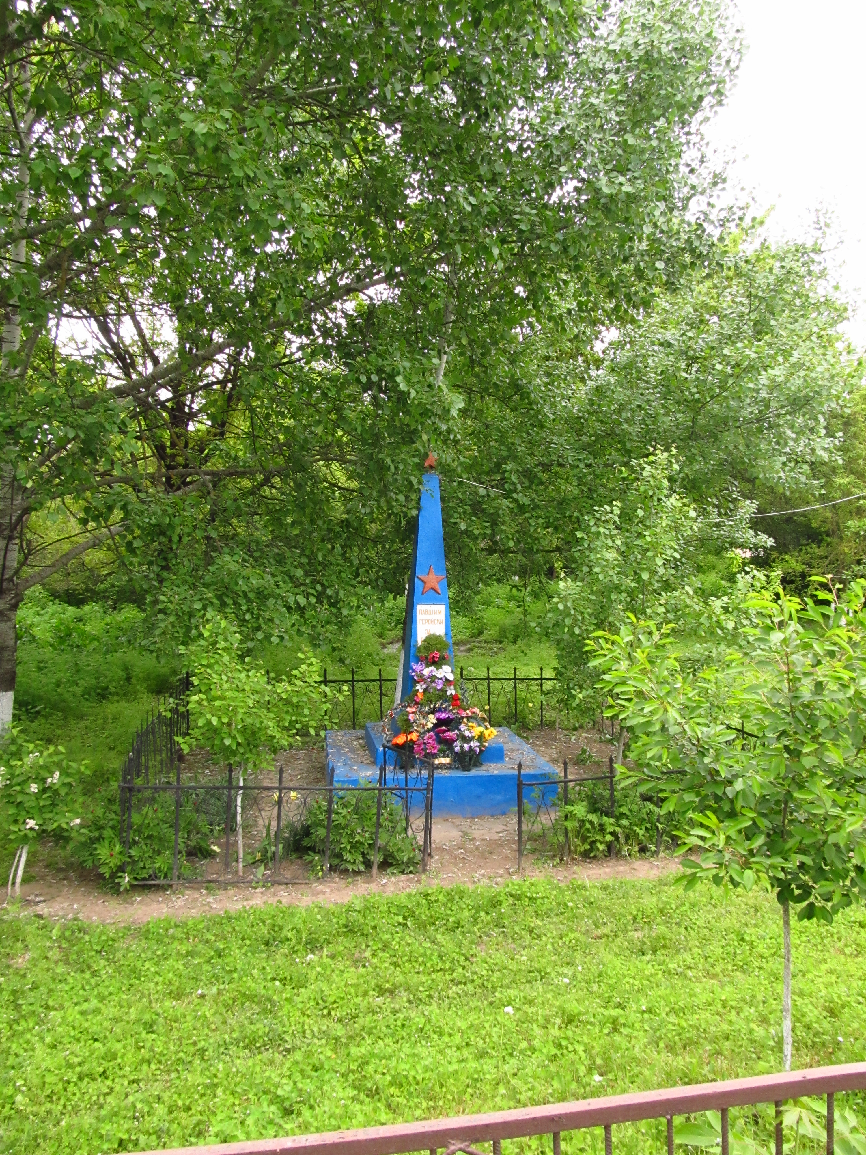 Пам’ятний знак воїнам-односельцям, загиблим на фронтах Великої Вітчизняної війни, Нові Трояни, центр села